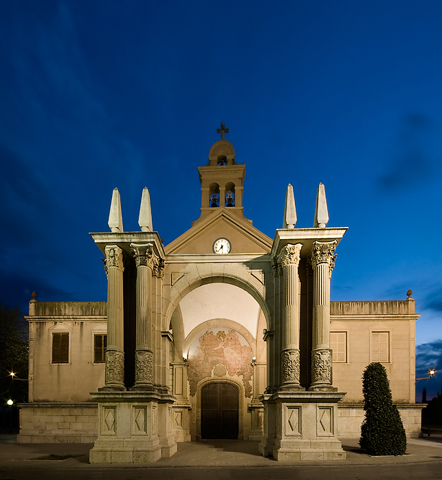 Vista nocturna del Santuari de Nostra Senyora de la Misericòrdia (Reus, Baix Camp).